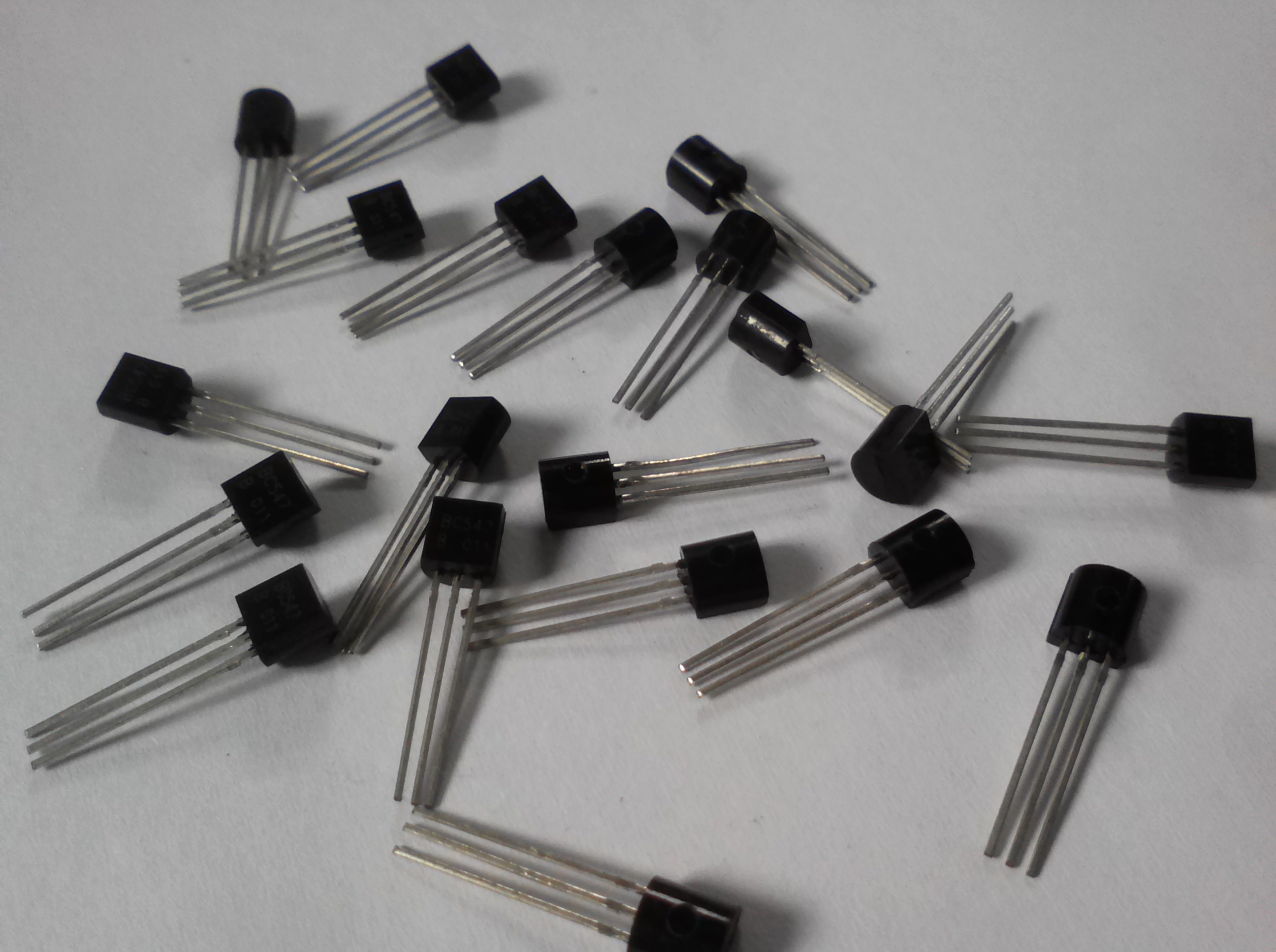 Hình ảnh bên ngoài của transistor.